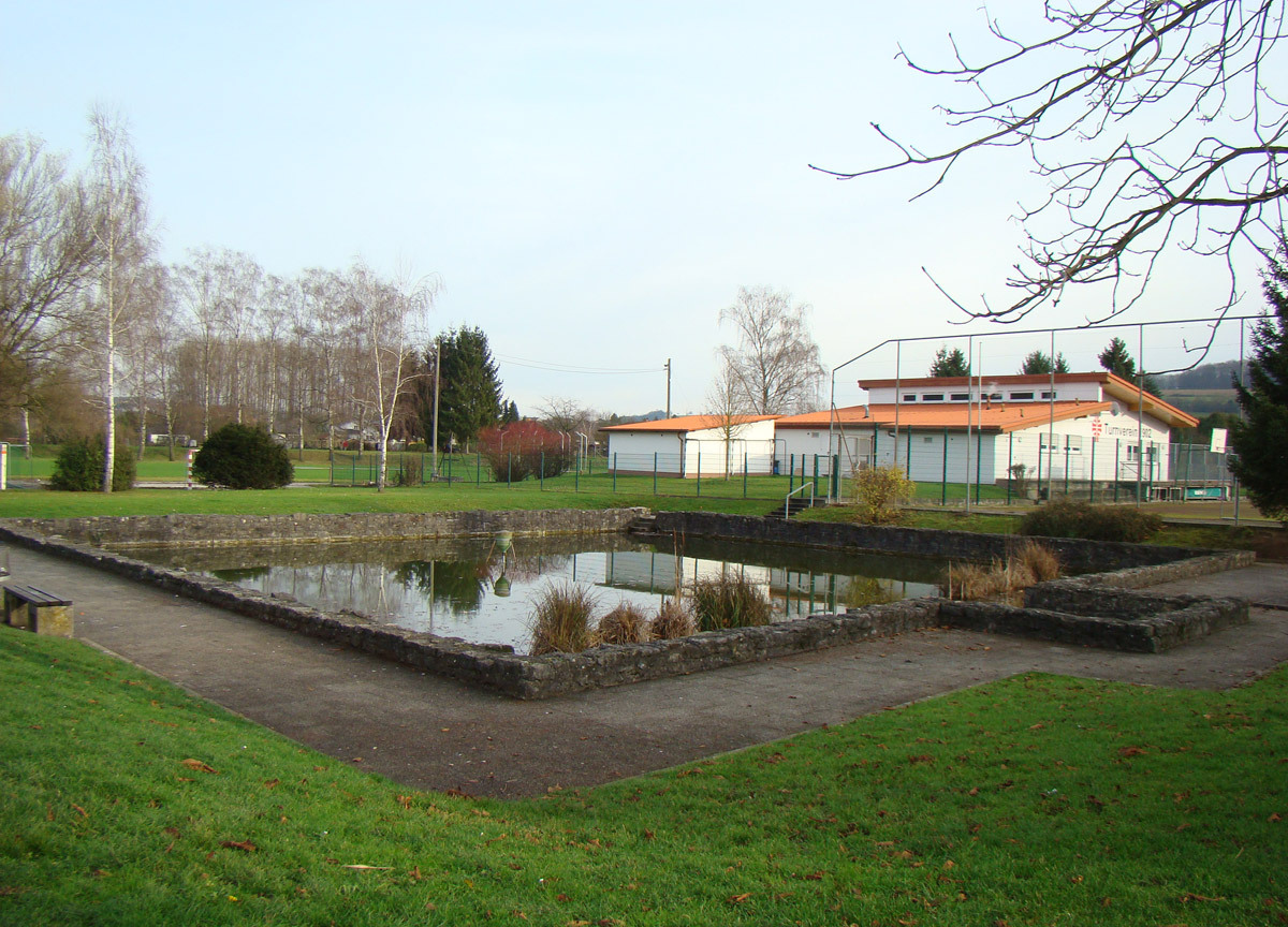 Das Wasserbecken am Sportplatz markiert den Standort der ehemaligen Wasserburg Eschelbronn